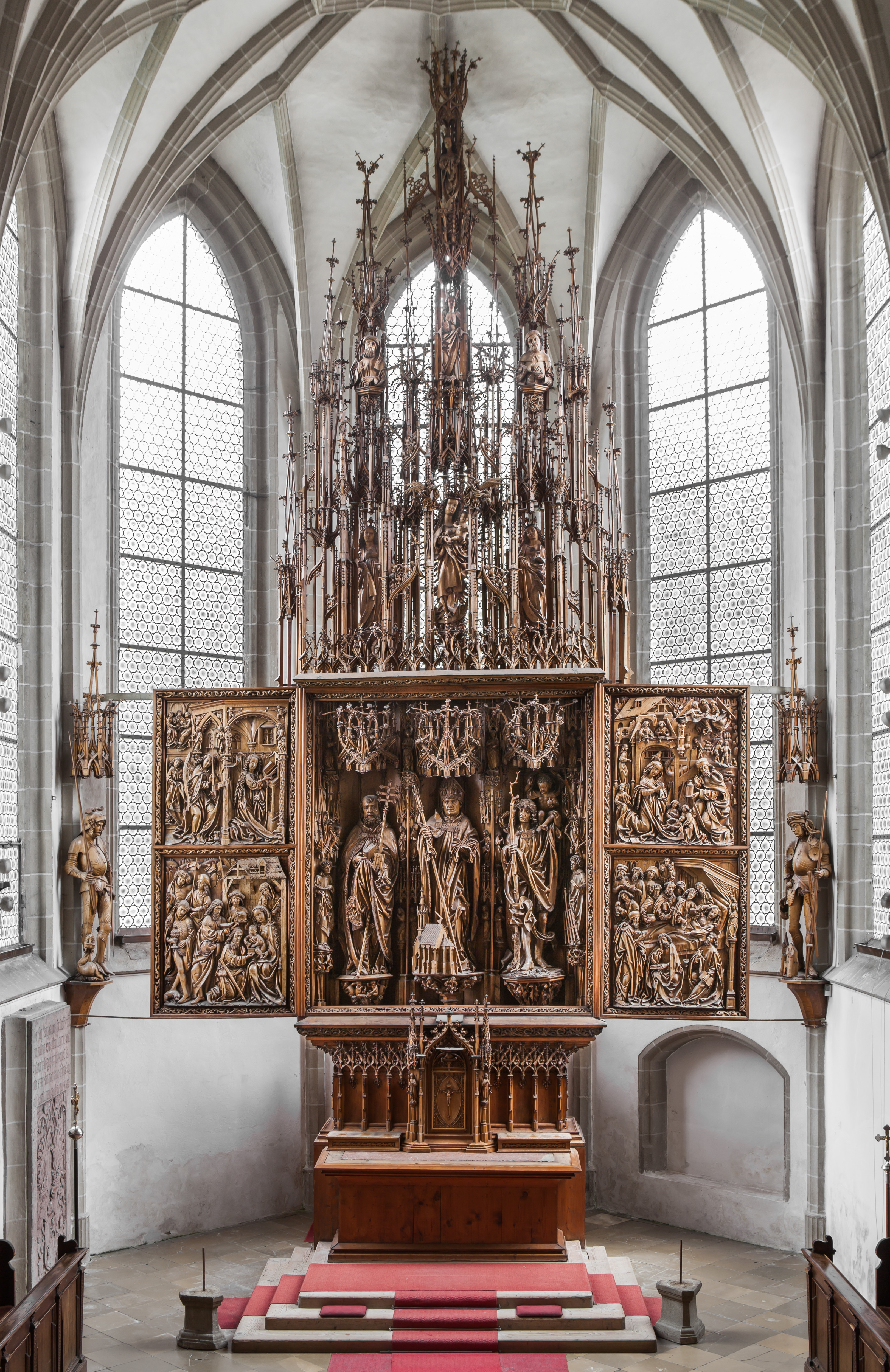 Der aus Lindenholz geschnitzte Hauptaltar wurde 1497 nach Beauftragung durch Kirchenerbauer Christoph von Zelking im Jahr 1490 und dessen Tod im Jahr 1491 von unbekanntem Meister fertiggestellt. Die 13,5 m x 6,5 m Größe verteilen sich auf Schrein, Gesprenge und Tafelbilder.